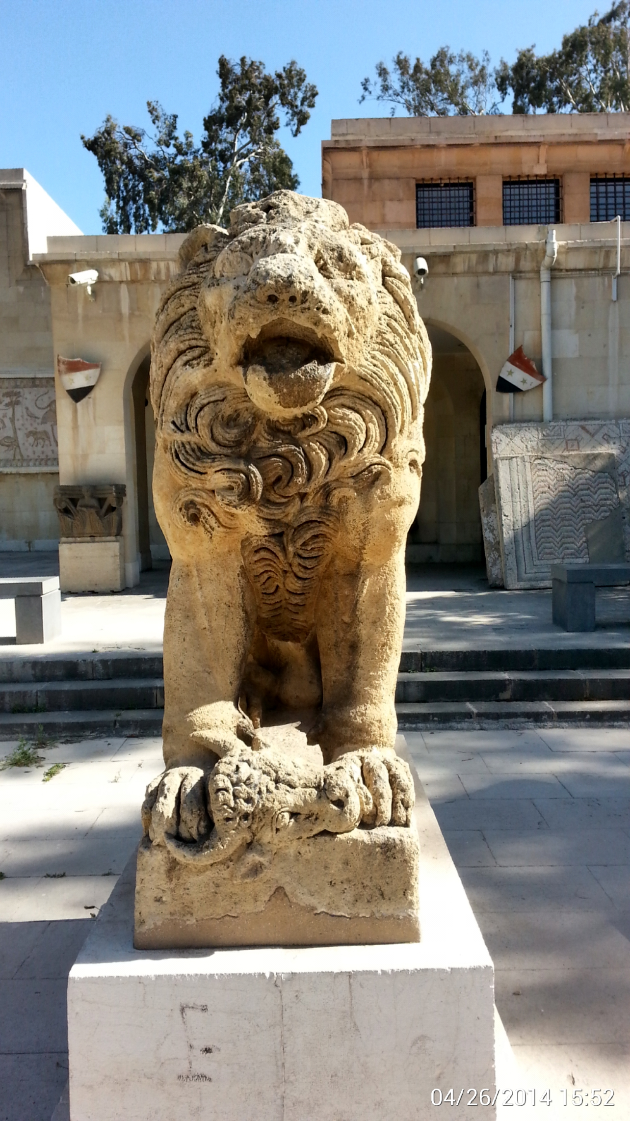 تمثال أسد جصي